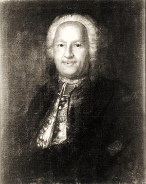 Porträt des Tübinger Medizinprofessors Johannes Bacmeisters